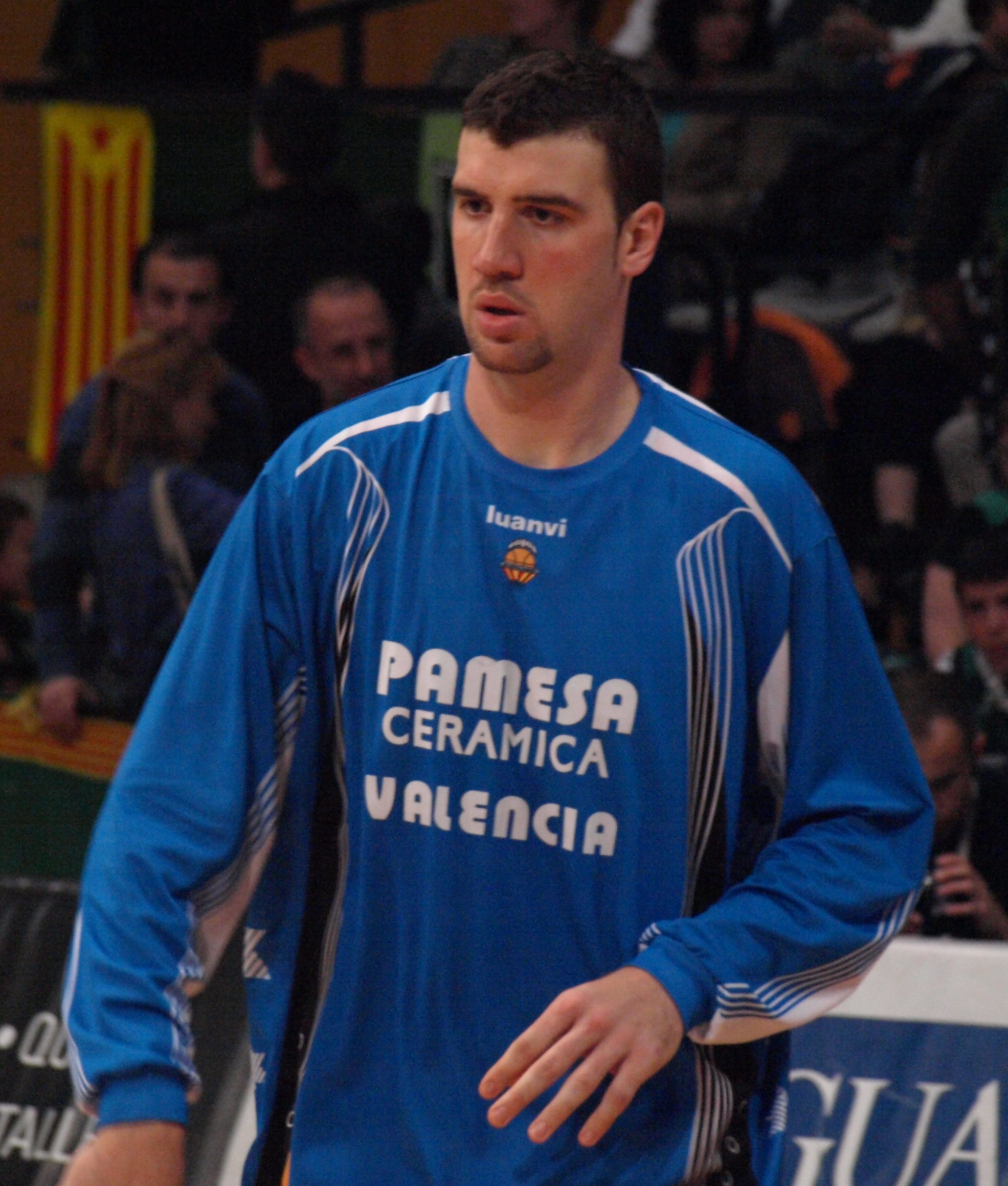 Albert Miralles en el partido que enfrentó a su equipo, el Pamesa Valencia, al DKV Joventut de liga ACB en el Pabellón Olímpico de Badalona en abril de 2009.